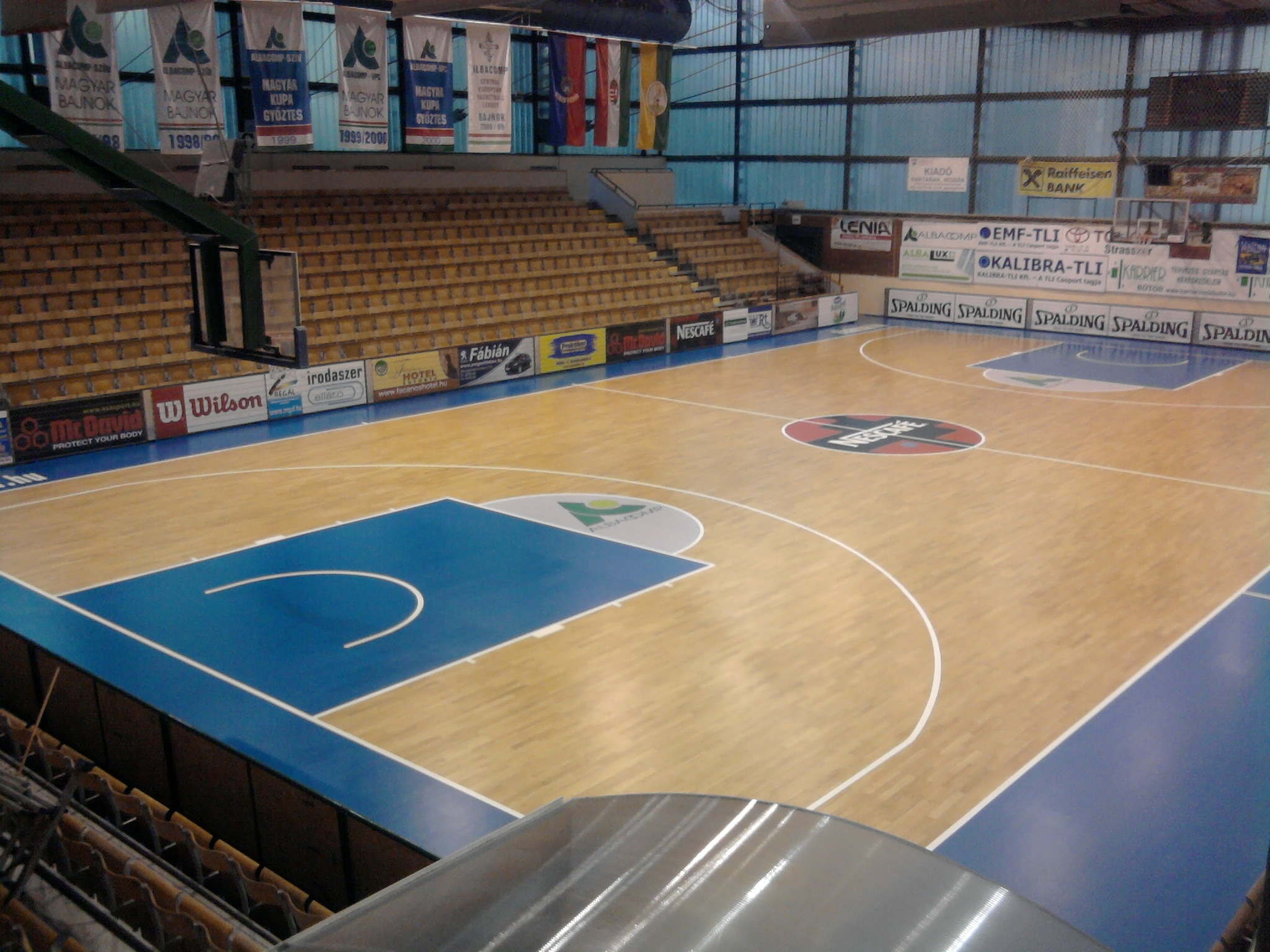 A székesfehérvári ARÉV Sportcentrum küzdőtere a 2010-es átfestés után